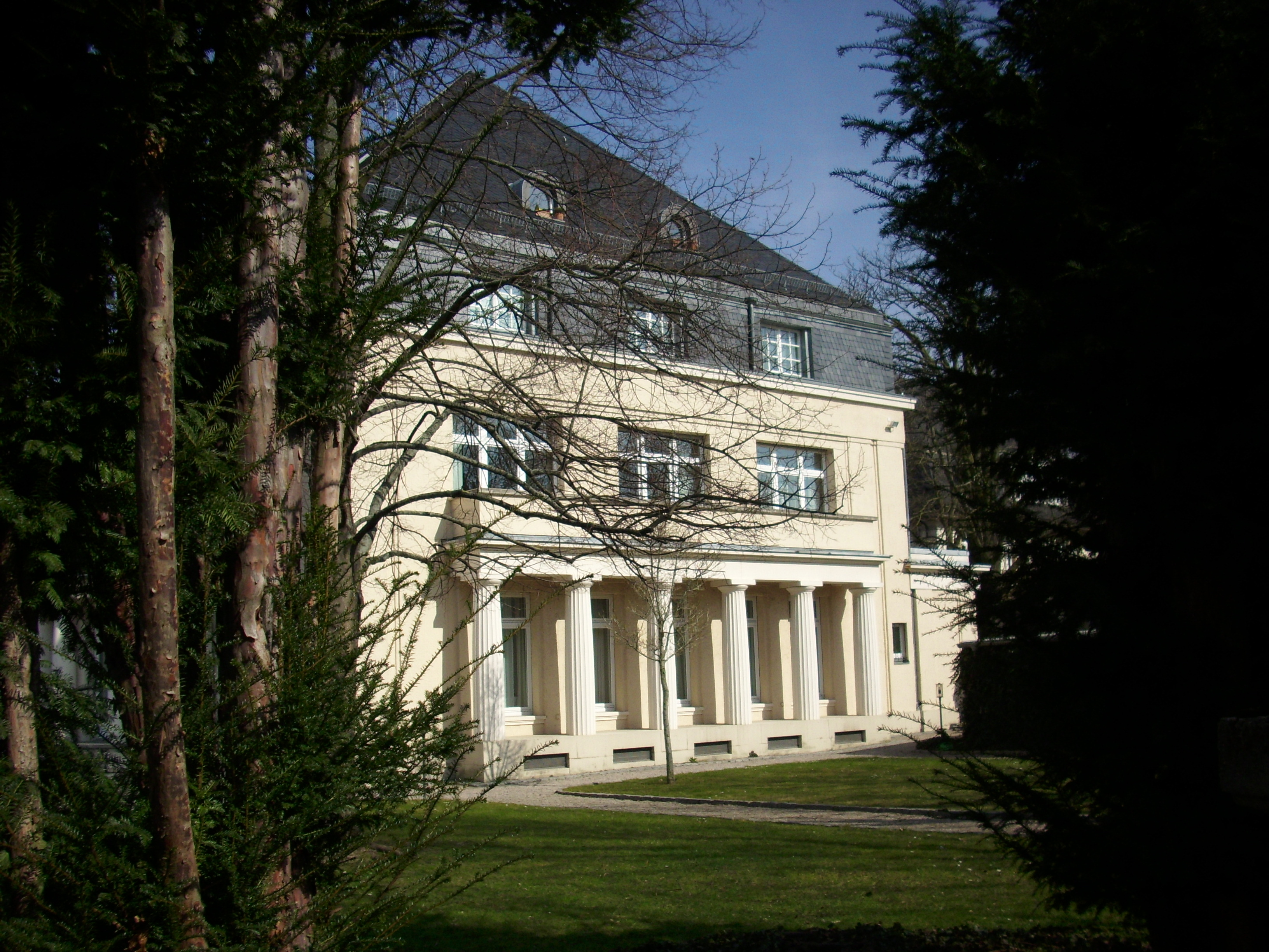 Ensemble aus Einzelvilla (Nr. 2, ehemalige Villa Jung) und den Zwillingsvillen Nr. 1 und 3 (ehemalige Villen Behnke) in beherrschender Lage im südlichen Teil der einstigen Bastion Alexander, 1913 errichtet